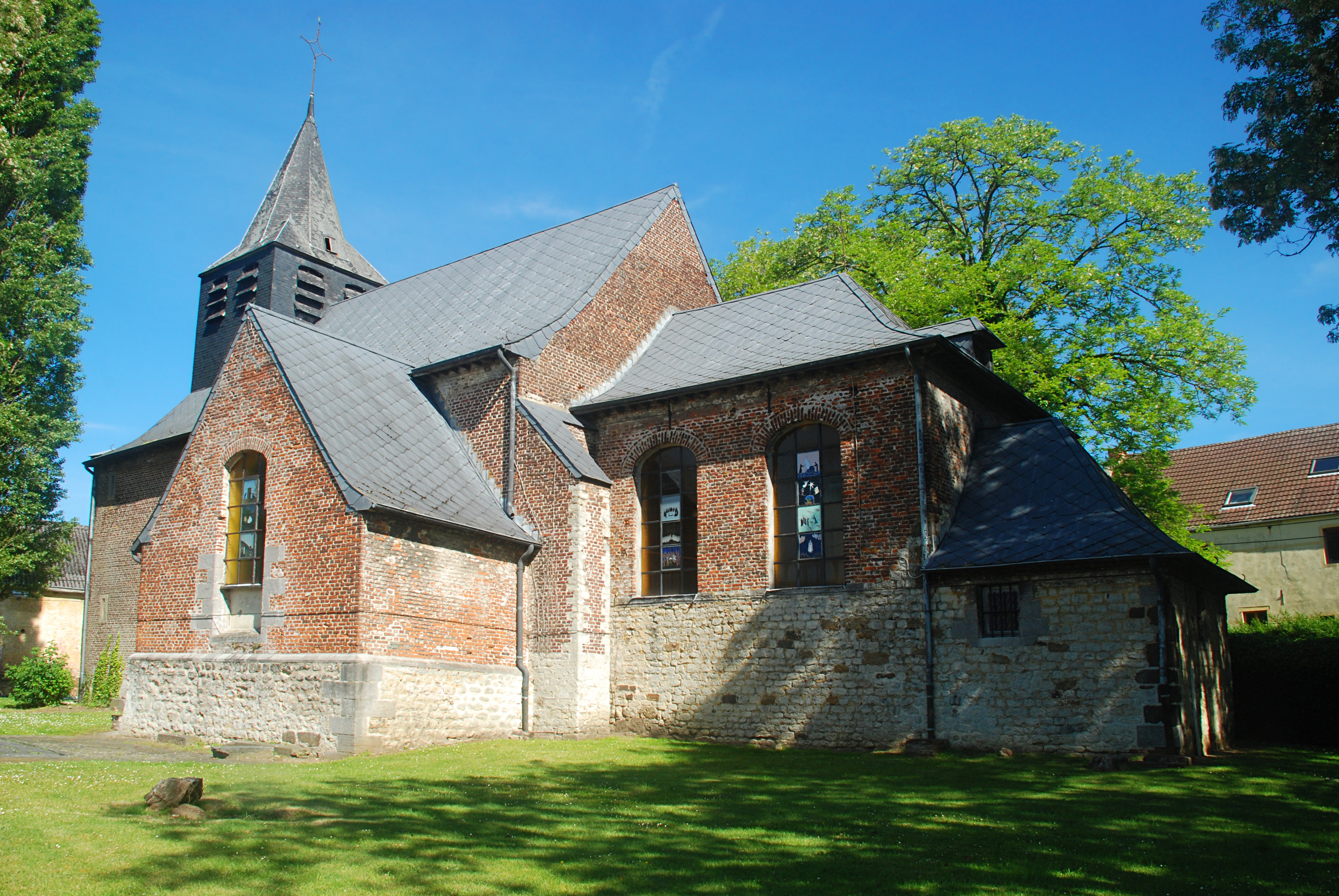 Belgique - Brabant wallon - Église Saint-Pierre de Glabais